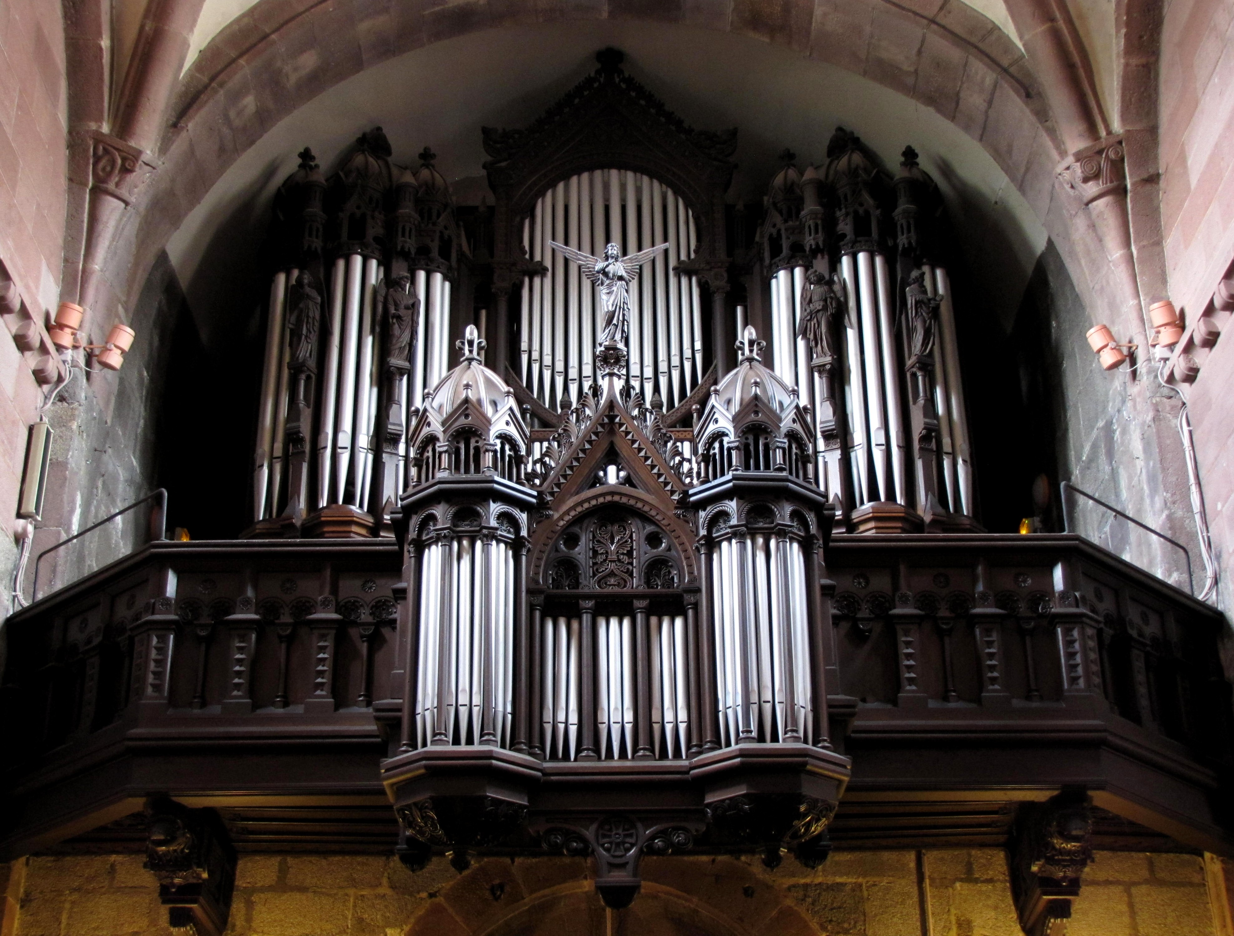 Alsace, Bas-Rhin, Sélestat, Église Sainte-Foy (PA00084981, IA00124586). Orgue de tribune Rinckenbach (1892)